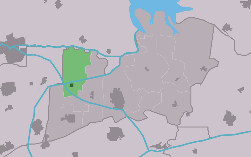 Kaartsje fan himrik fan Westergeast